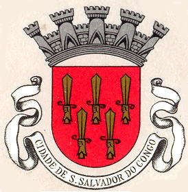 Brasão de São Salvador do Congo (Mbanza-Kongo).